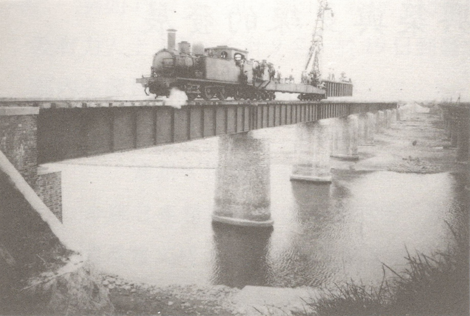 海岸線建設工程進行中，頭份溪鐵橋。